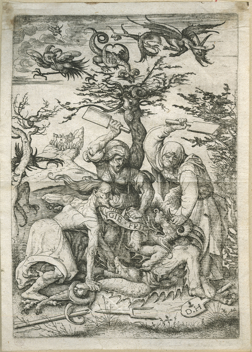 Hopfer, Daniel (vers 1470-1536): ‘Gib Frid’, Drei Hexen verprügeln den am Boden liegenden Dämon (Three old women beating a Devil on the ground). Eisenradierung/etching, ca. 22,3 : 15,6 cm. Bartsch 71; Hollstein 80/I (von II). Guter Druck vor der Funck-Nummer. Auf Papier mit Wz. "Doppelköpfiger Adler mit Krone". Mittelfalte; links unten leicht gestaucht; obere Ecken etwas braunfleckig, links mit kleinem Einriß. Verso mit Vermerken früherer Besitzer. A little worn centre right.